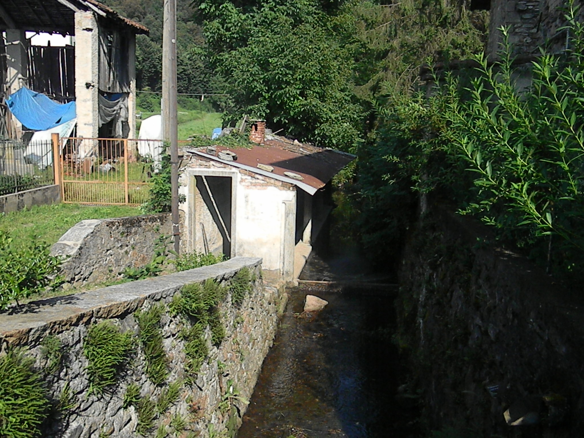 Antico lavatoio di Brinzio